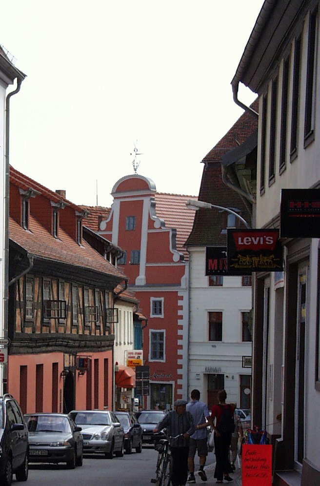 die Stadt